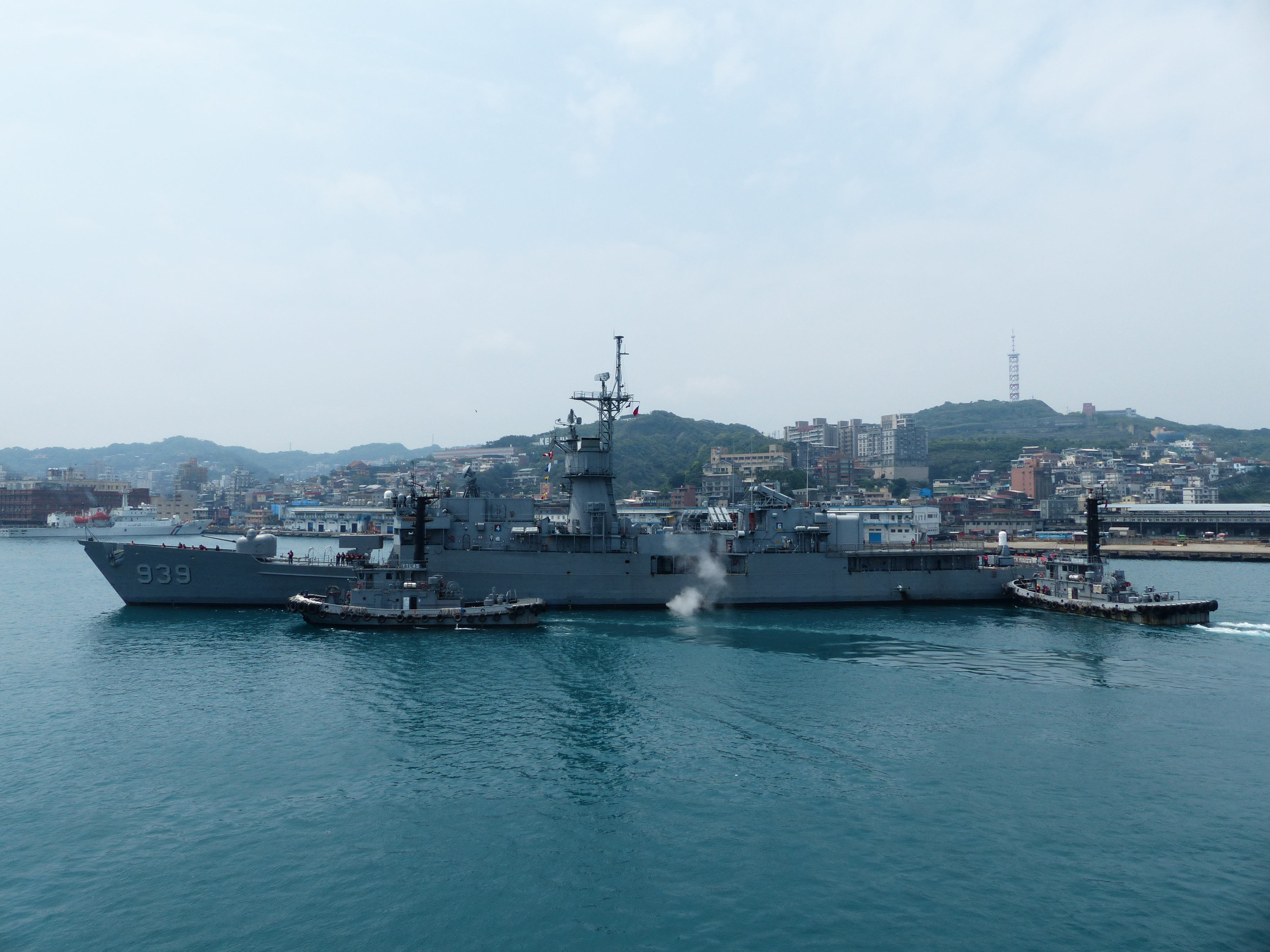 基隆港海軍港務拖船YTL49協助濟陽級巡防艦宜陽（FFG-939）轉向中，YTL45也接近艦艏。